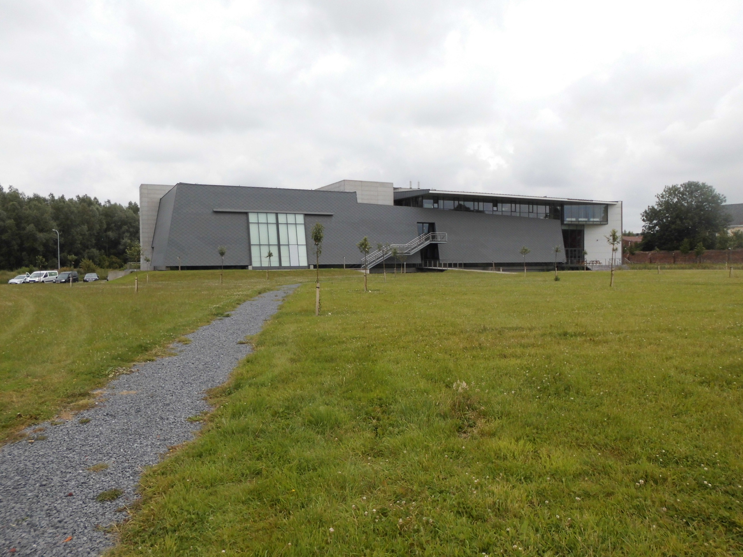 Provinciaal Erfgoedcentrum - Lotharingenstraat - Ename - Oudenaarde - Oost-Vlaanderen - België